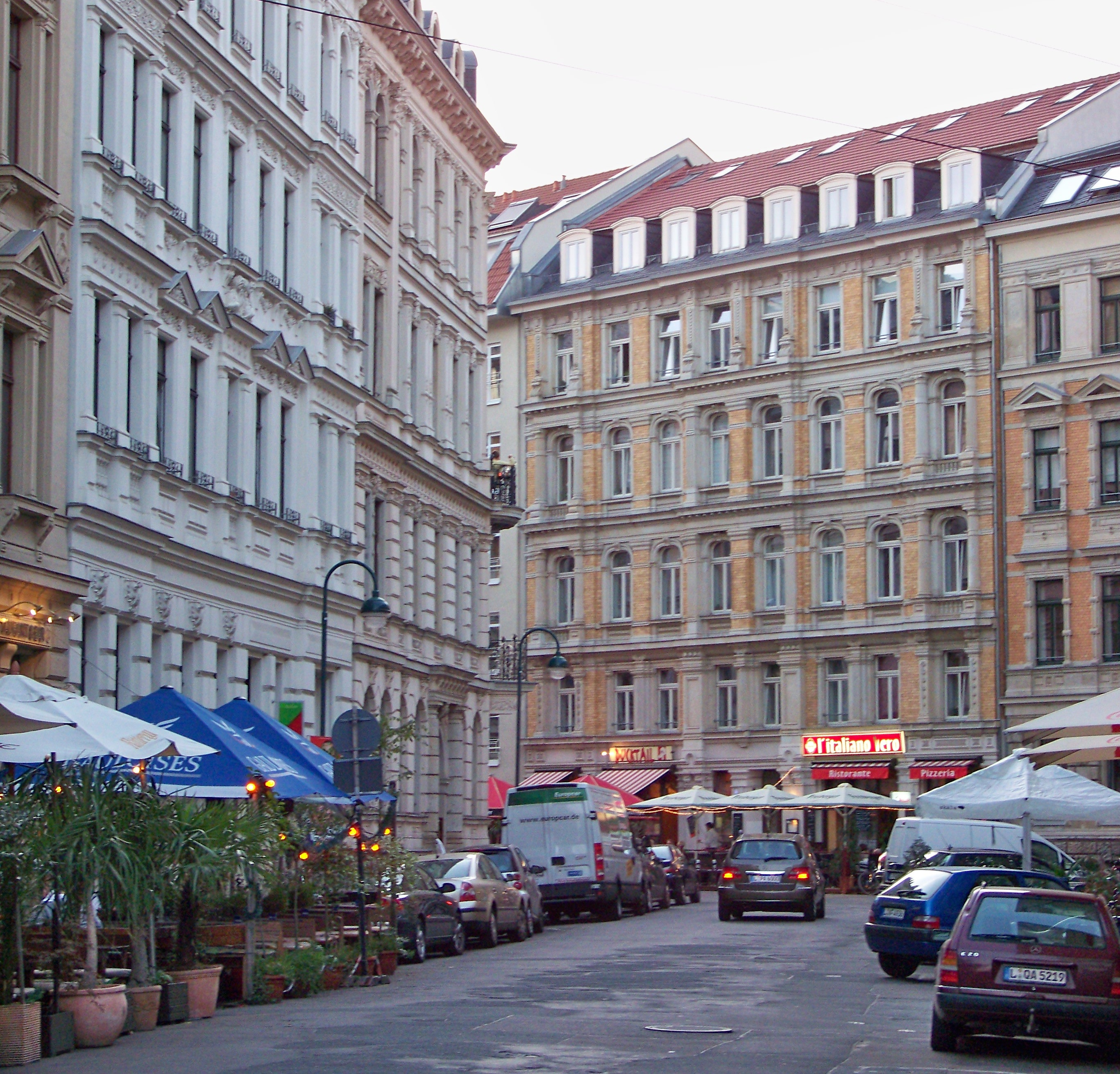 Gottschedstraße in Leipzig, aus der Käthe-Kollwitz-Straße gesehen